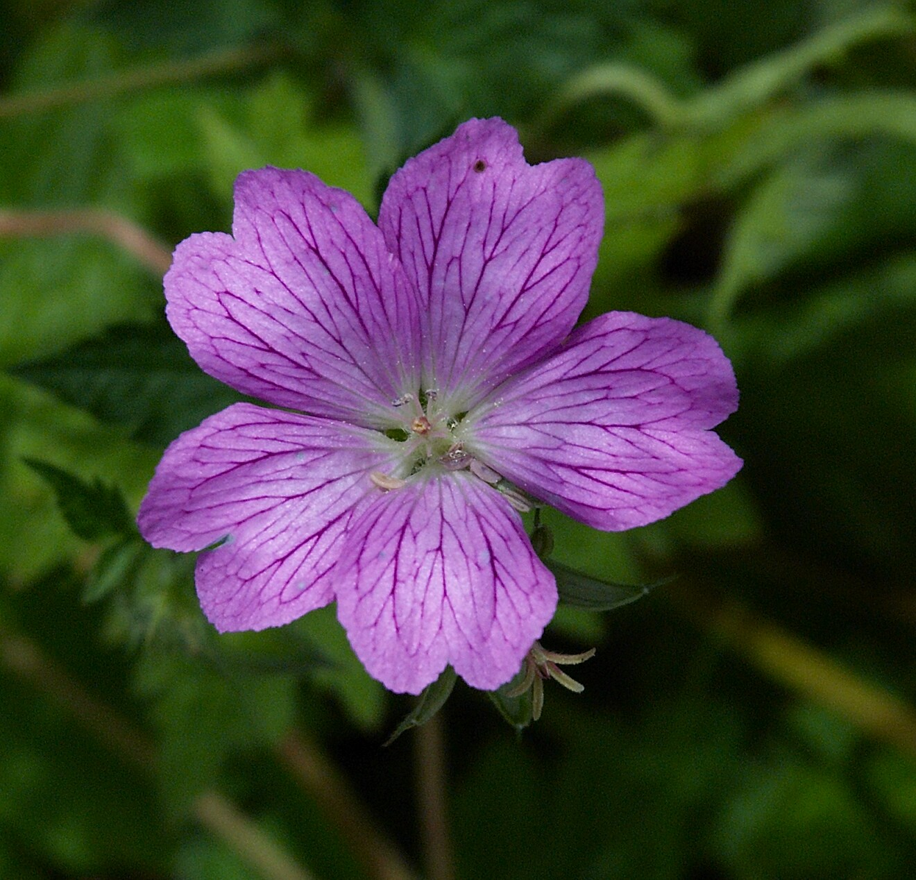 Geranium endressii ‘Wargrave Pink’